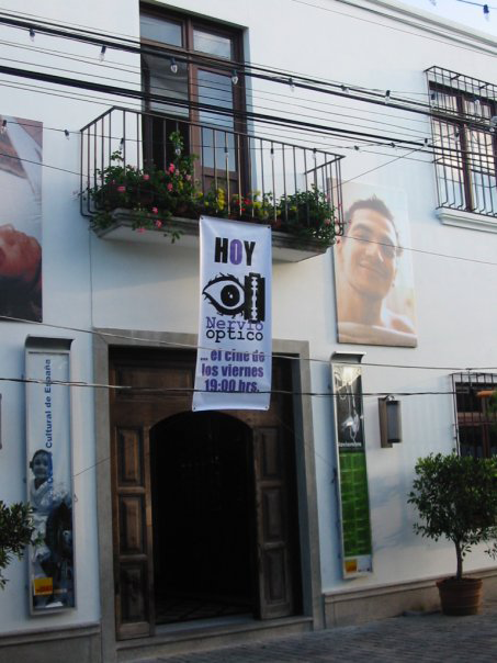 fachada del CCE/G (Centro Cultural de España en Guatemala).